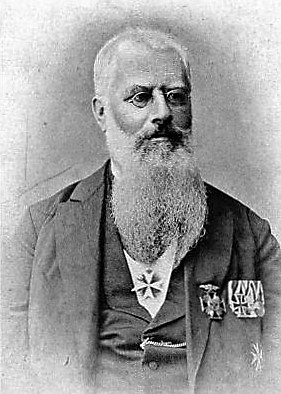 Lucas von Heyden, aus: Ein Lebensbild des Professors Lucas von Heyden in Bockenheim bei Frankfurt a.M. In: Entomologische Blätter 4 (1908), S. 85f